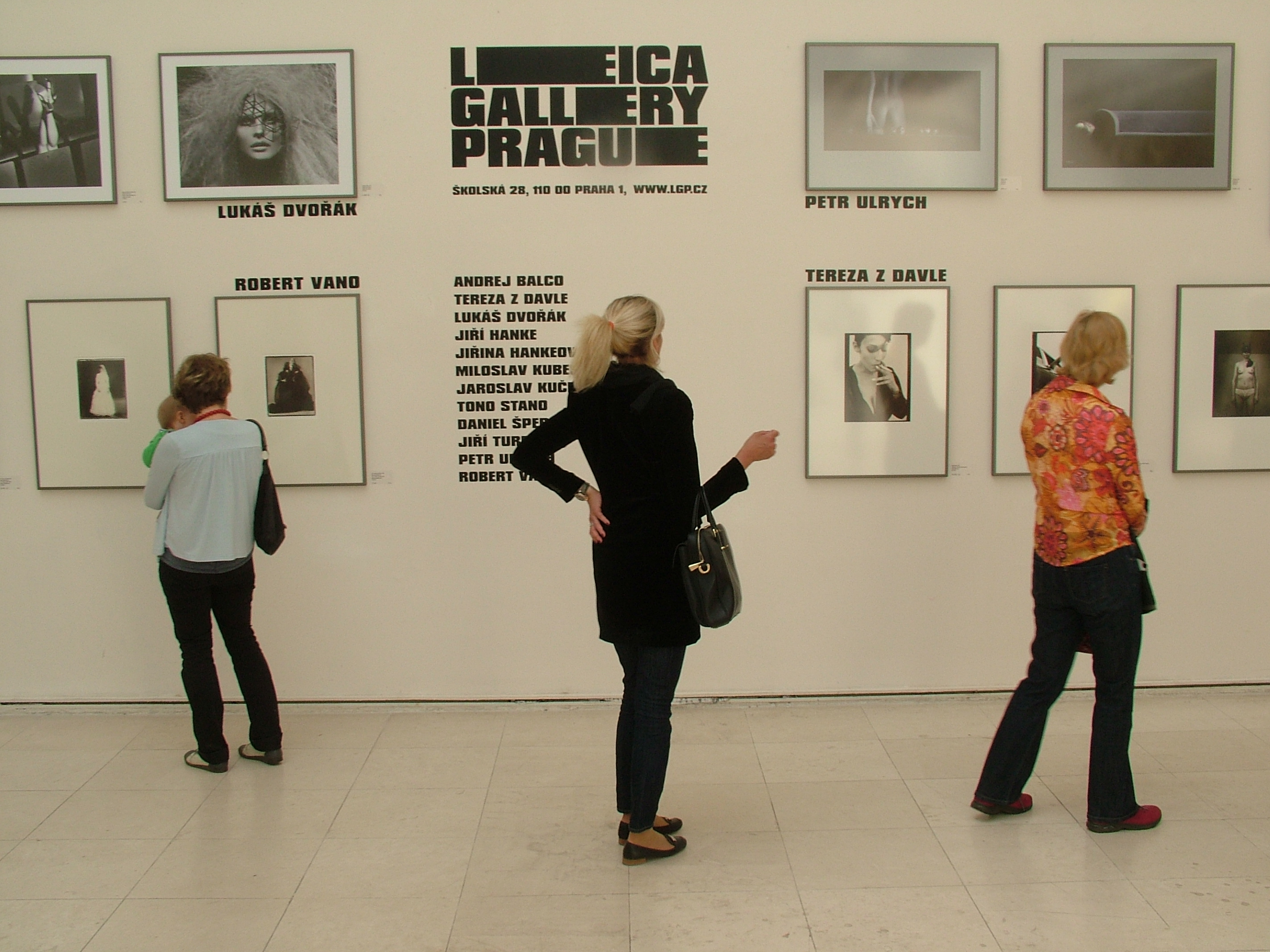 Výstava, festival, Prague Photo 2011 Budova: Mánes, Praha Trvání: od 4. dubna do 10. dubna 2011. Datum: 10. dubna 2011.